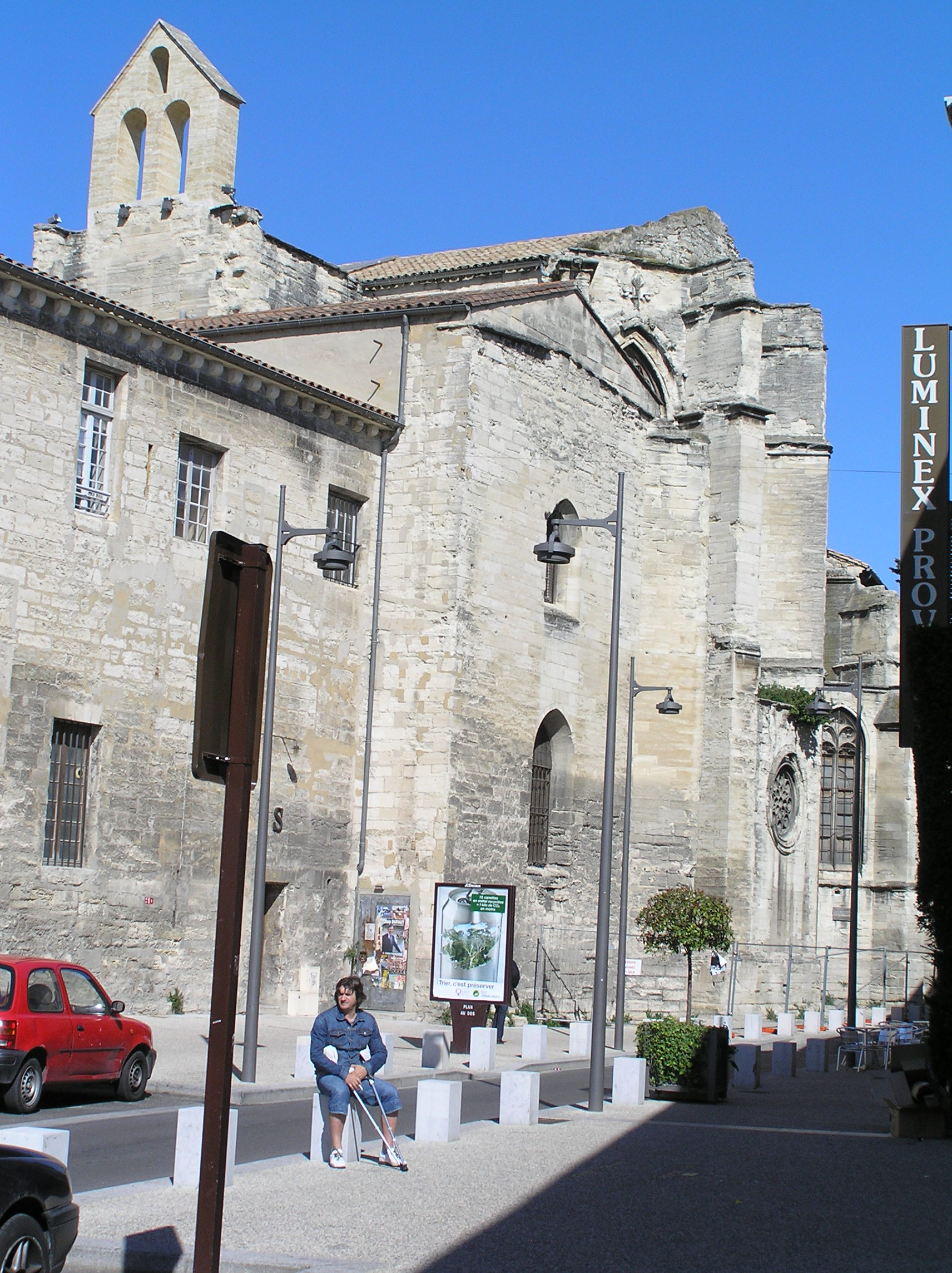 Avignon, Couvent des Célestins